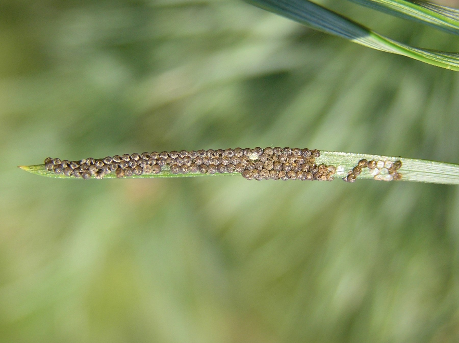 Panolis flammea, Strzygonia chojnówka, Polska